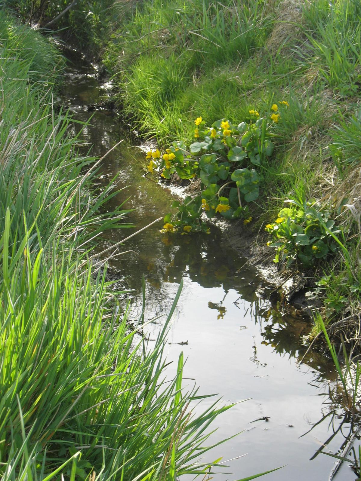 Okolice Wojcieszyc